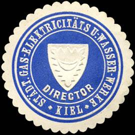 Sealing stamp Title: Director-Städtische Gas-Elektricitäts und Wasserwerke-Kiel Description: blau, weiß, geprägt Place: Kiel size: 4 cm